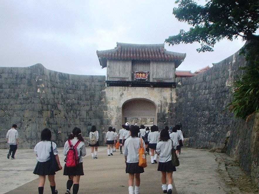 首里城歓会門を外側から望む